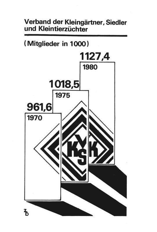 ADN-ZB Grafik 9.10.1981-Der Verband der Kleingärtner, Siedler und Kleintierzüchter der DDR wurde am 28.11.1959 in Leipzig gegründet. Es gibt 8 659 -Sparten im Verband und 670 688 kleinere Gärten. Seine Mitglieder widmen sich ferner der Zucht und Haltung von nahezu 20 Kleintierarten in ungefähr 500 Rasen. 34.000 Imker halten 467.000 Bienenvölker. Quelle: ADN-Information